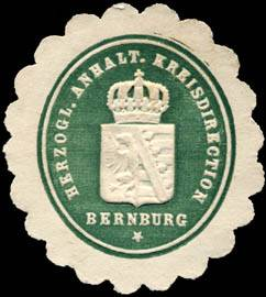 Sealing stamp Title: Herzoglich Anhaltische Kreisdirection - Bernburg Description: grün, weiß, geprägt Place: Bernburg size: 4x3 cm